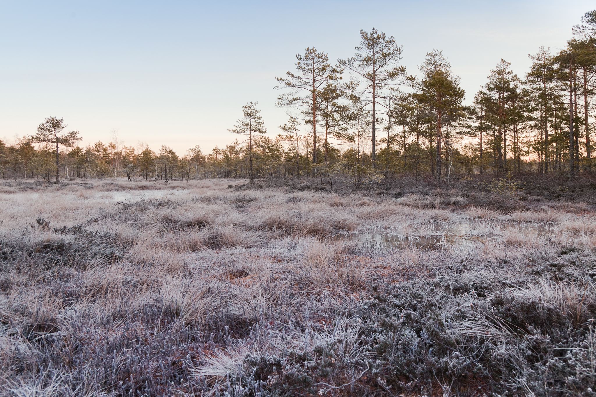 Teiču dabas rezervāts